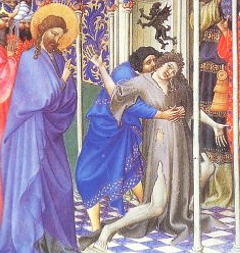 Handschriftenillumination aus einem Stundenbuch des Grafen von Berry Très Riches Heures du duc de Berry